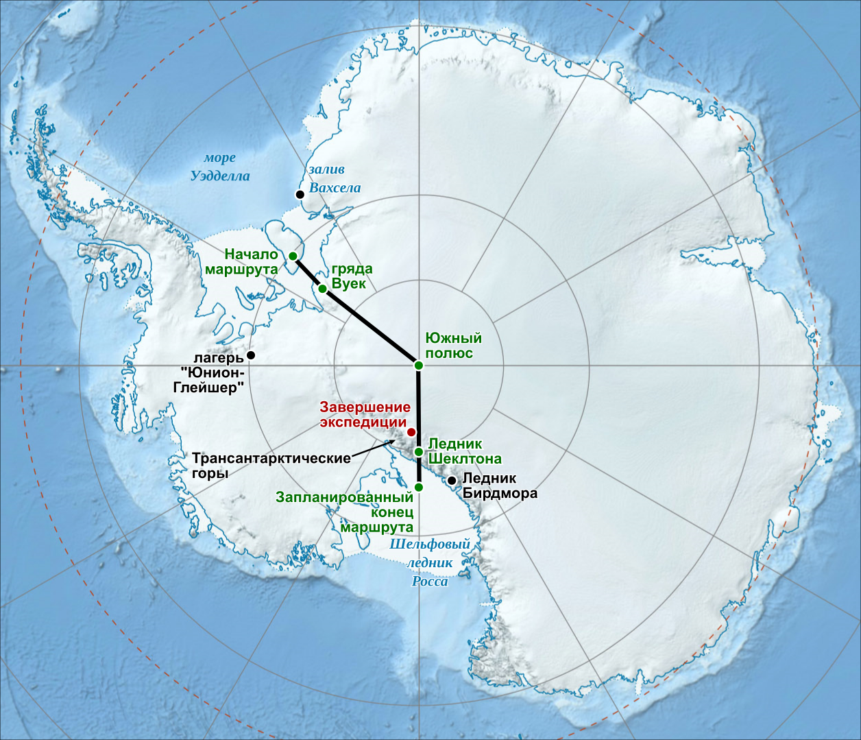 Карта последней антарктической экспедиции Генри Уорсли (2015-16 г.)